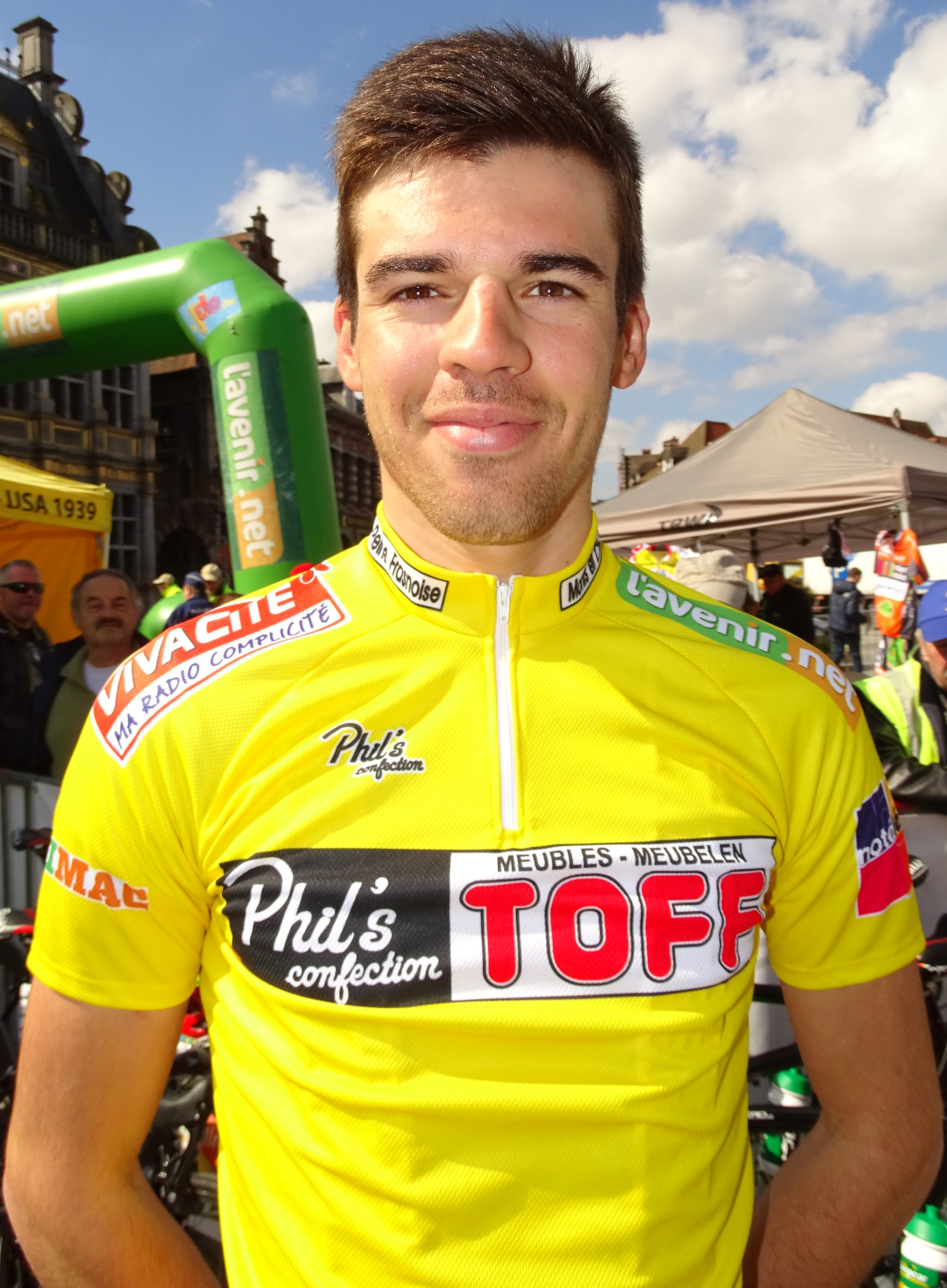 Triptyque des Monts et Châteaux 2015 Depicted person: Lilian Calmejane Depicted team: Vendée U